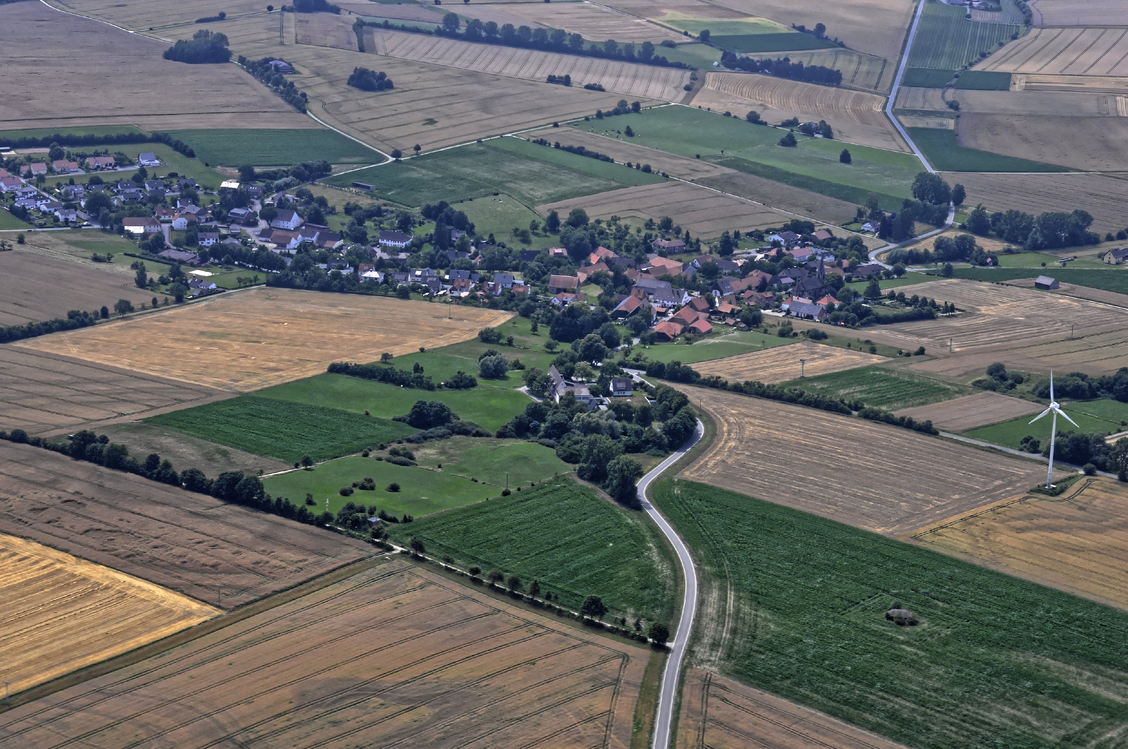 Bilder vom Flug Nordholz-Hammelburg 2015: Brakel-Frohnhausen